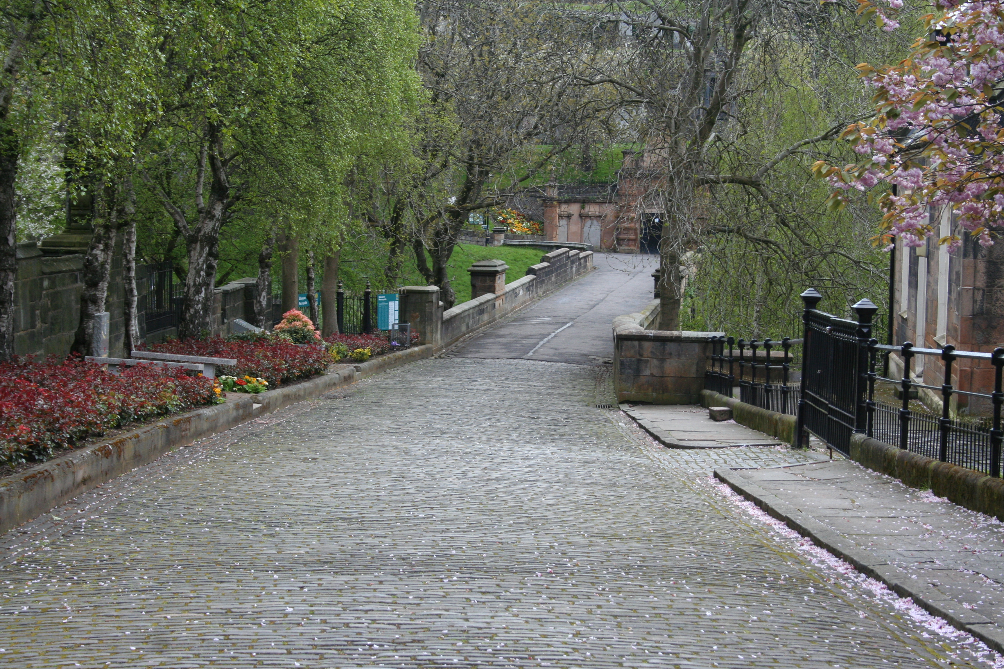 Bridge of Sighs (Cathedral Square, Mehr Informationen), Eingangstor zum Friedhof Necropolis (Mehr Informationen) in Glasgow.